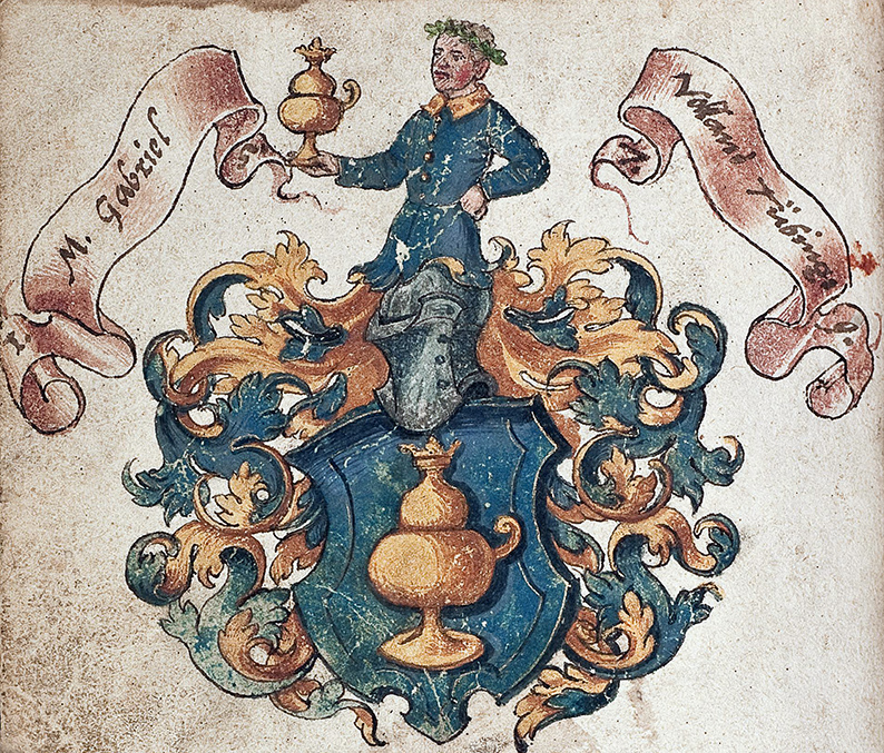 Wappen von M. (Magister) Gabriel Volland, Tübingen, 1579 (in einzelnen Ziffern)